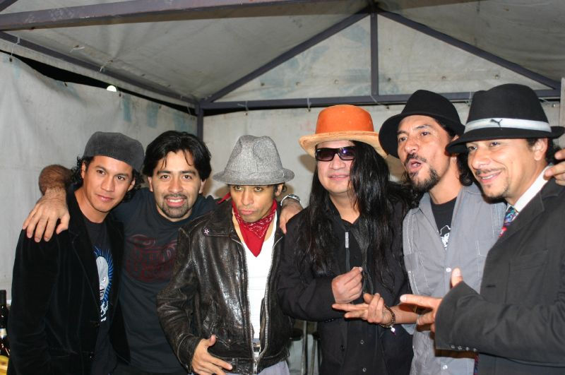 Maldita Vecindadla maldita (7)